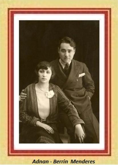 Berrin & Adnan Menderes (1928)